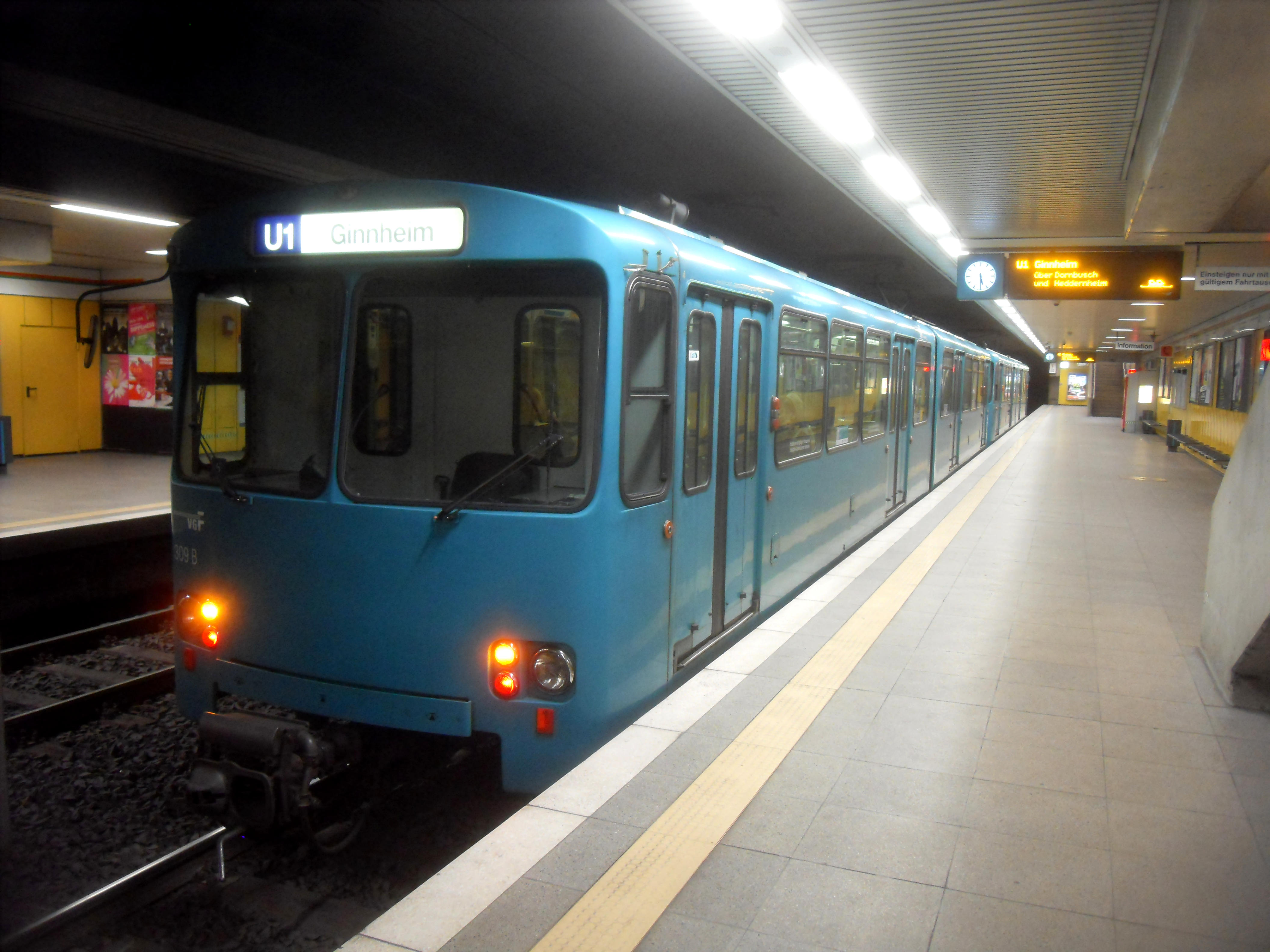 U 2-Triebwagen der U-Bahn Frankfurt im U-Bahnhof Eschenheimer Tor auf der Linie U 1 auf dem Weg nach Frankfurt-Ginnheim in Hessen (Deutschland)